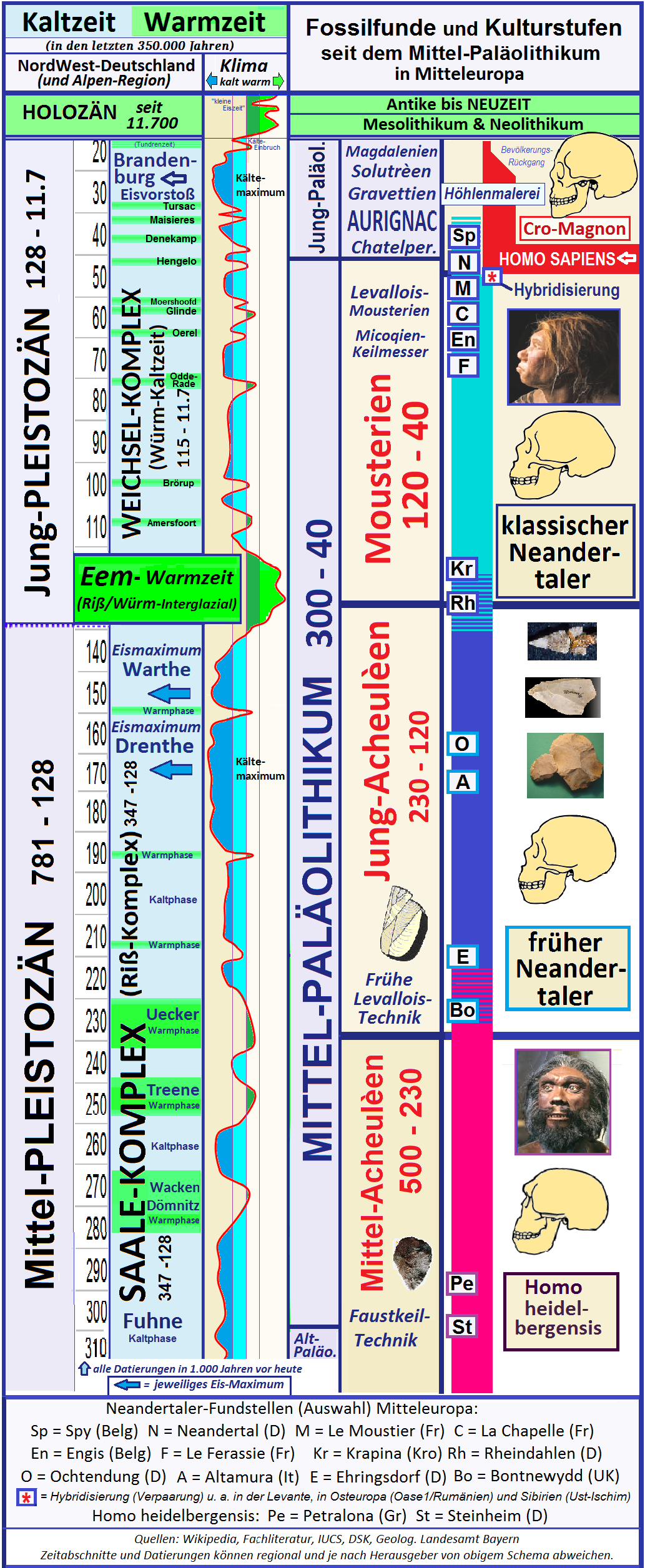 Korrelation von Eiszeit- und Steinzeitperioden bis zum Mittelpleistozän